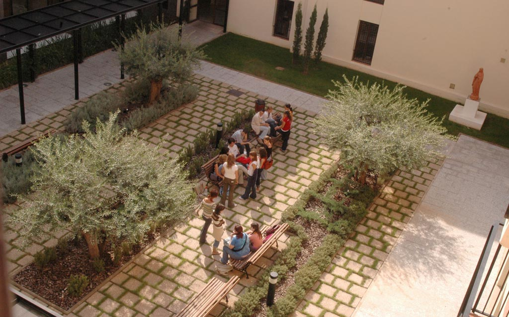 Patio de la sede Santa Úrsula